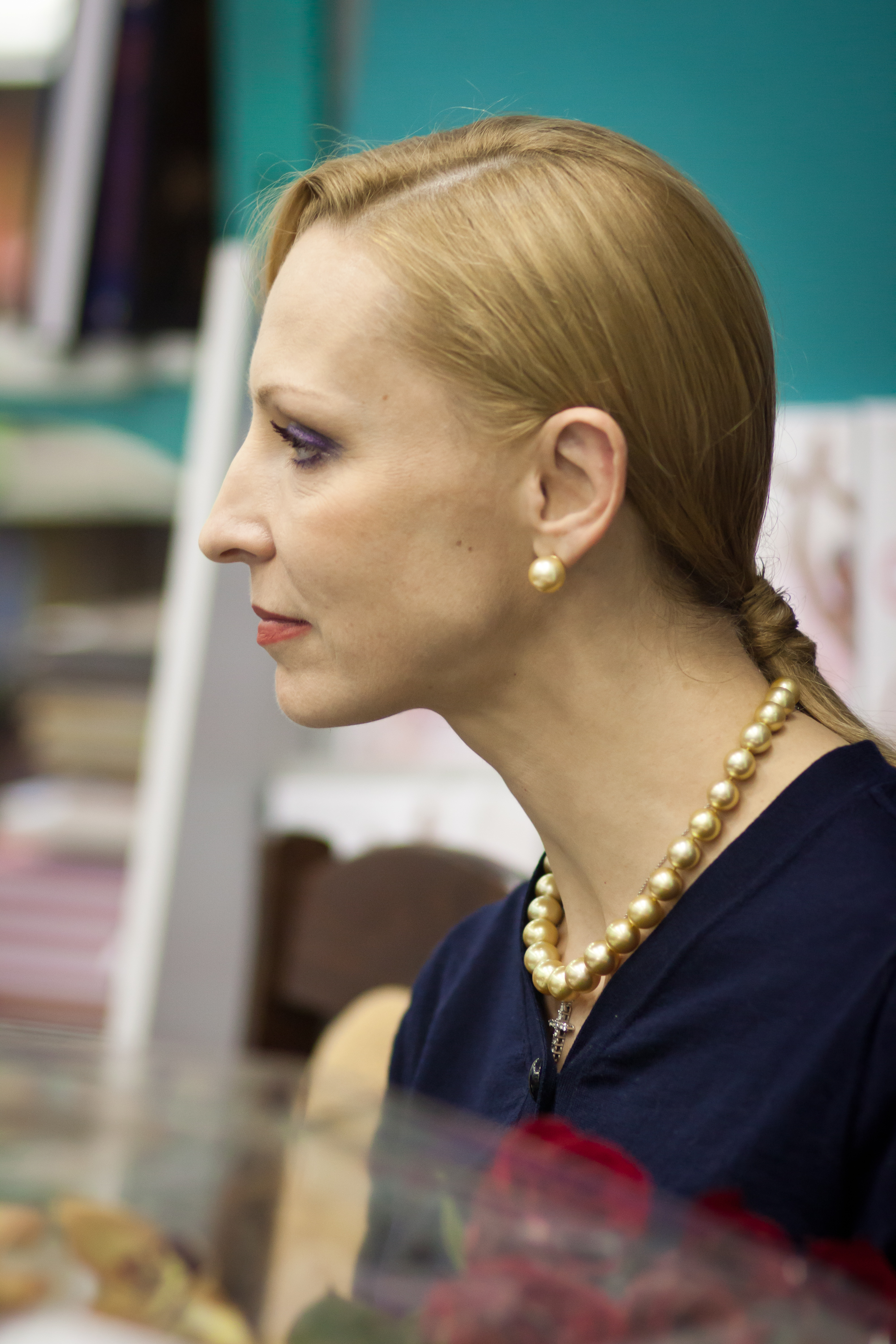 Балерина Илзе Лиепа